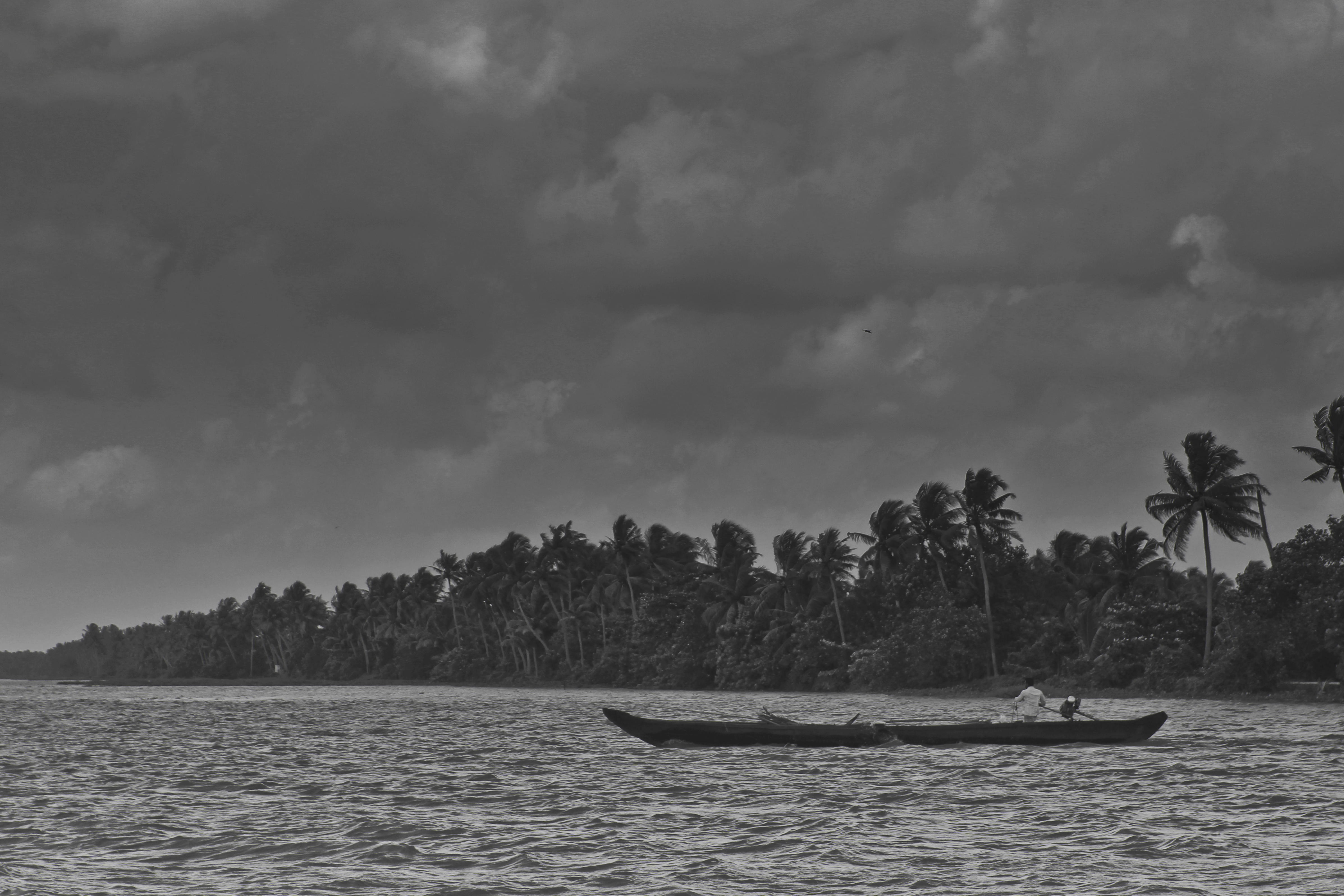 @Allappuzha,Kerala Facebook Page